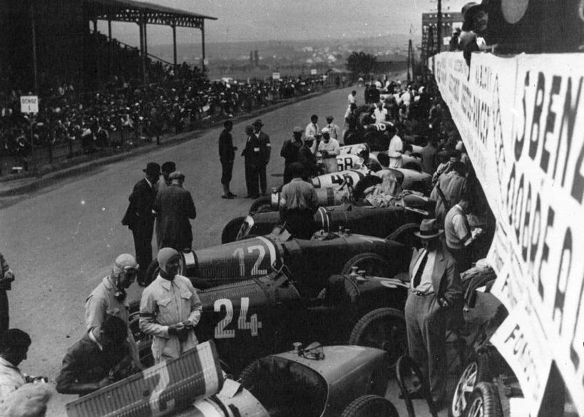 Départ du Grand Prix de Tchécoslovaquie 1932